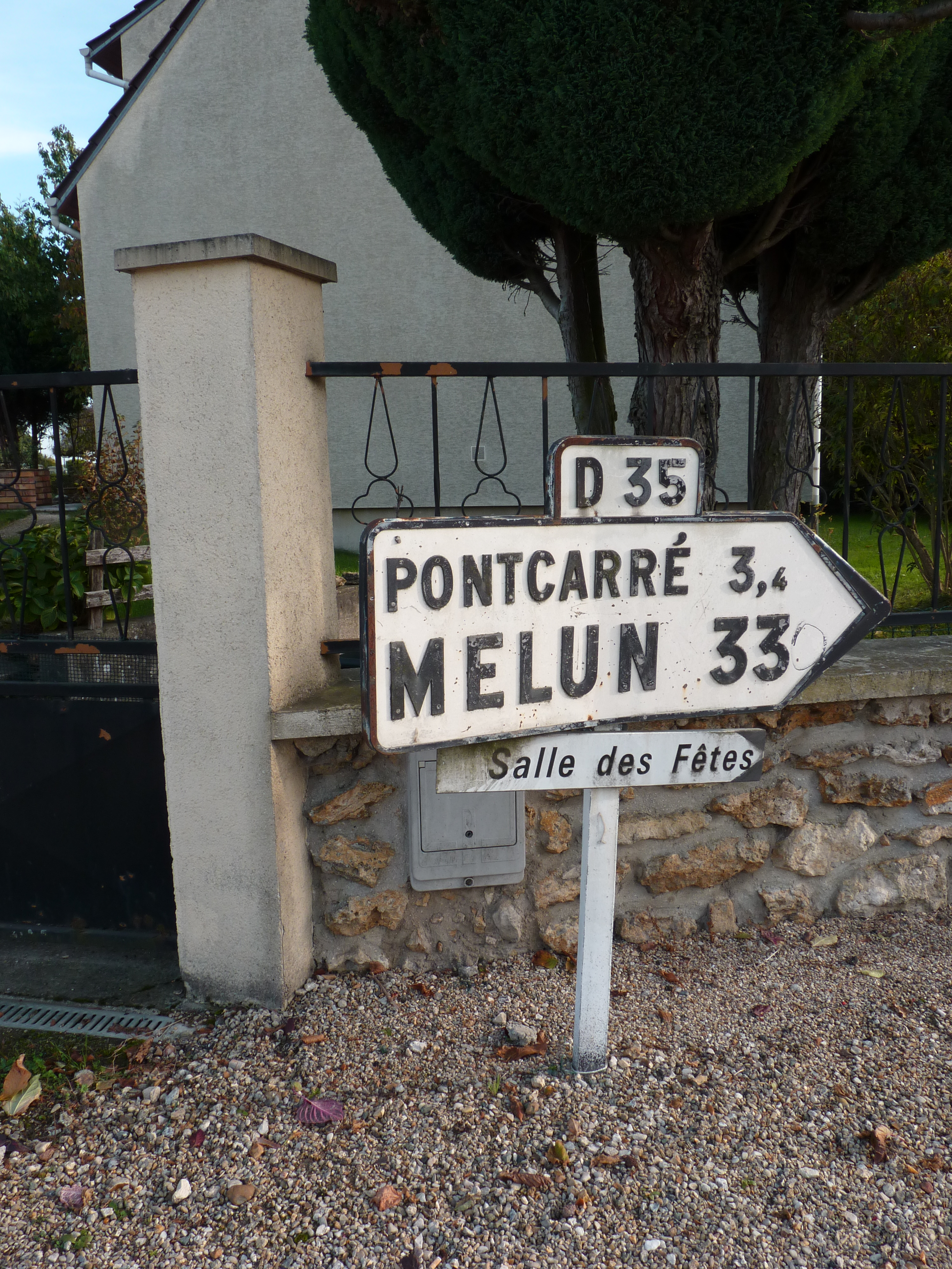 Panneau directionnel sur la route départementale 35 (de Lagny-sur-Marne à Melun) à Ferrières-en-Brie.